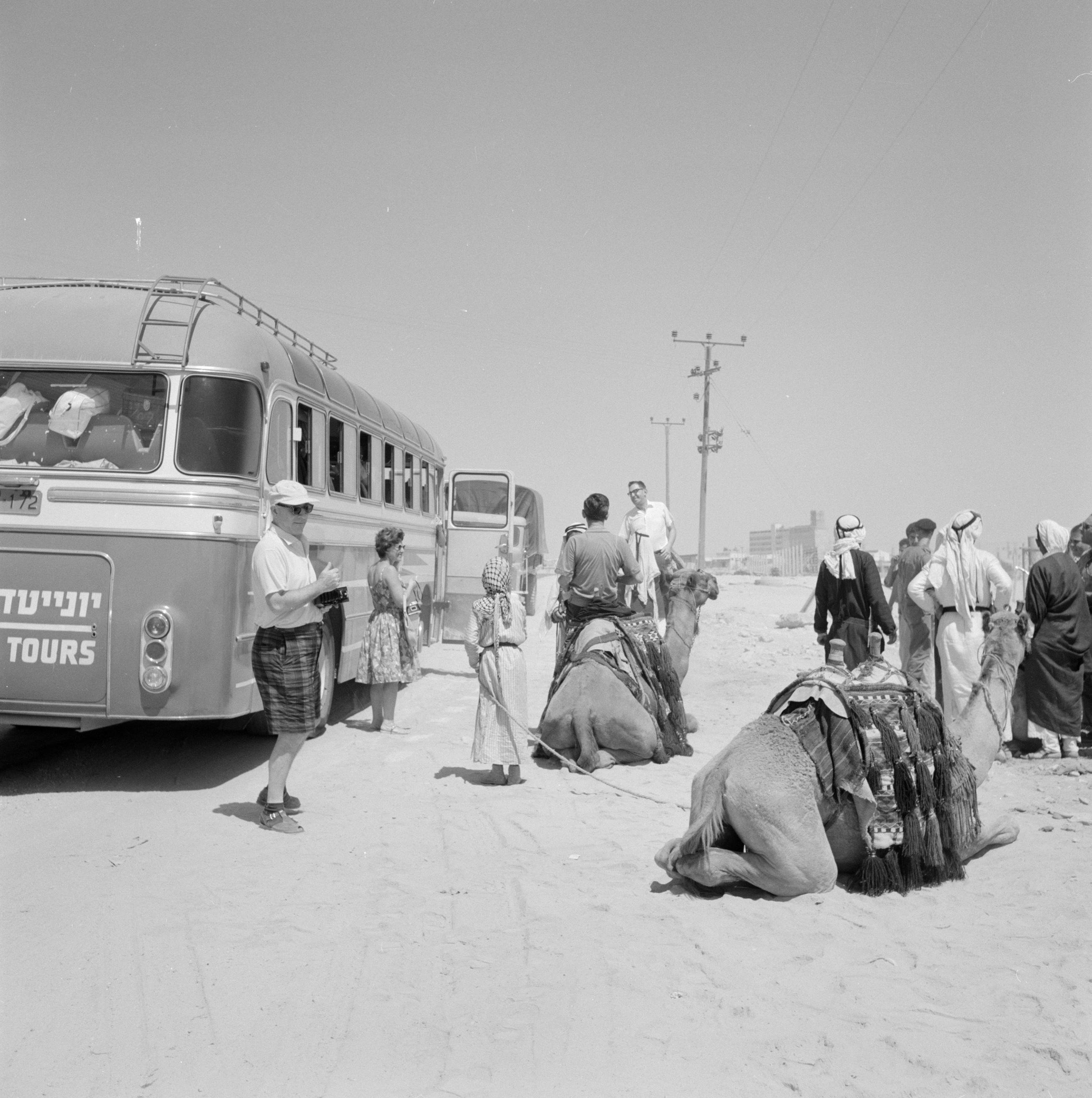 Collectie / Archief : Fotocollectie Van de Poll Reportage / Serie : Israël 1960-1965: bedoeïenen in Beersjewa (Beer Sheva) Beschrijving : Bus met toeristen is in de woestijn bij Beersjewa gestopt om de passagiers gelegenheid te bieden een bedoeienenkamp te bezoeken en een ritje te maken op een kameel Datum : 1 januari 1960 Locatie : Bersjeba, Israël Trefwoorden : autobussen, bedoeïenen, kamelen, toerisme, woestijnen Fotograaf : Poll, Willem van de, [onbekend] Auteursrechthebbende : Nationaal Archief Materiaalsoort : Negatief (zwart/wit) Nummer archiefinventaris : bekijk toegang 2.24.14.02 Bestanddeelnummer : 255-3464